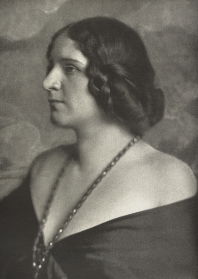 Elsa Laura von Wolzogen (1876-1945), deutsche Musikerin. Fotografie, Universitätsbibliothek Trier, Signatur z13842B-1912.